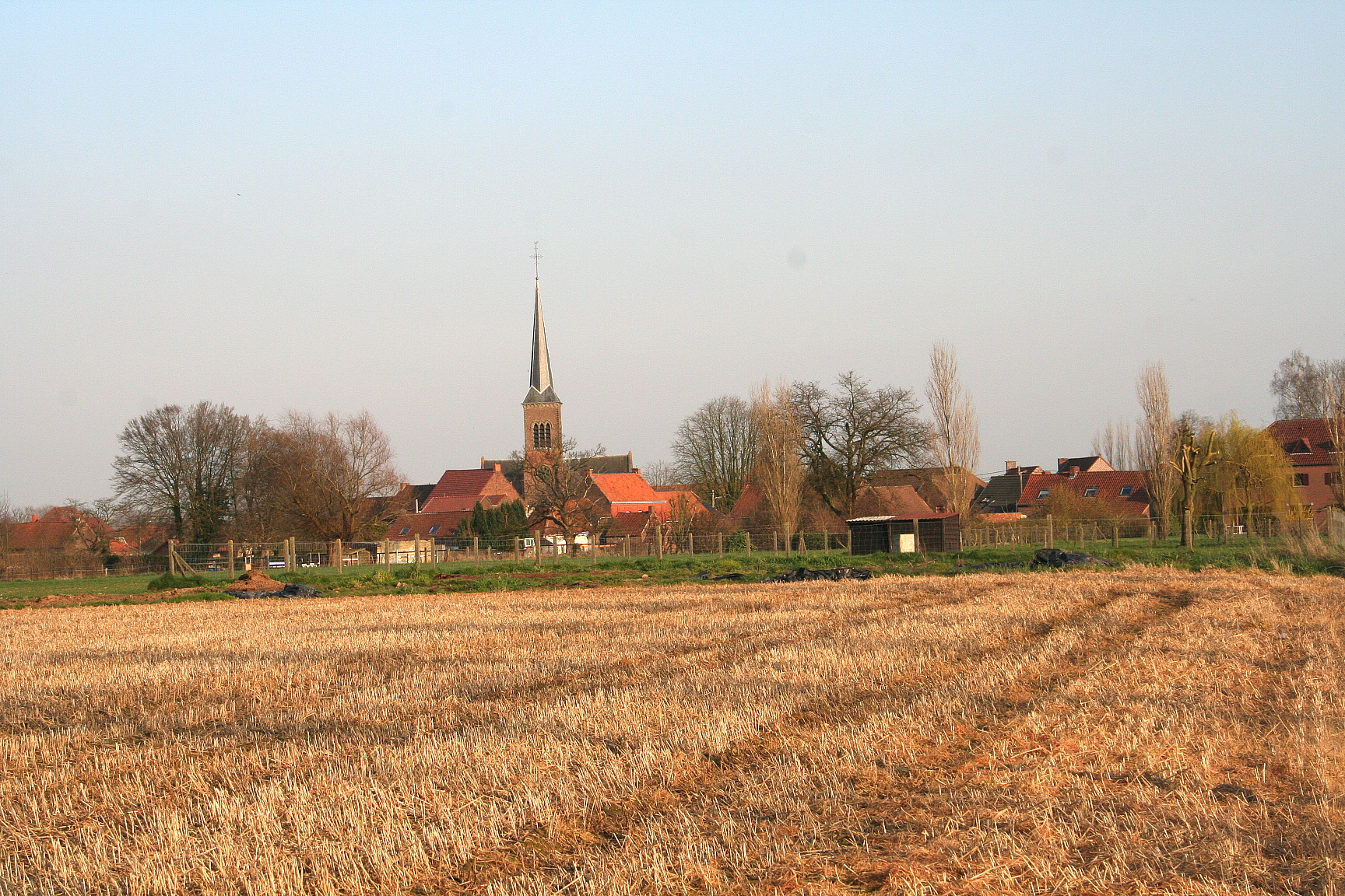 Brasménil (Belgique), le quartier de l'église.